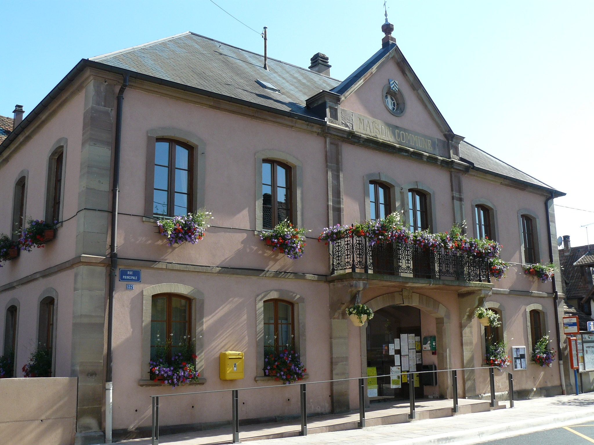 Mairie de Westhouse (1845)